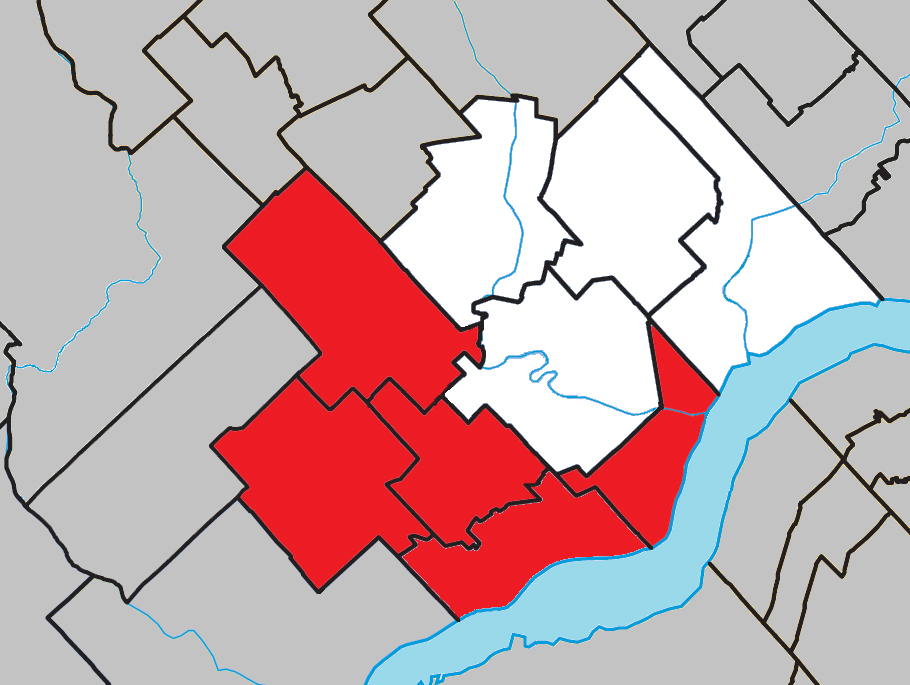 Localisation de la paroisse Saint-Laurent-de-la-Moraine dans la MRC des Chenaux, en Mauricie, au Québec. Auteur du fond de carte : Gordalmighty. C'est moi qui ai coloré sa carte pour situer la paroisse Saint-Laurent-de-la-Moraine.